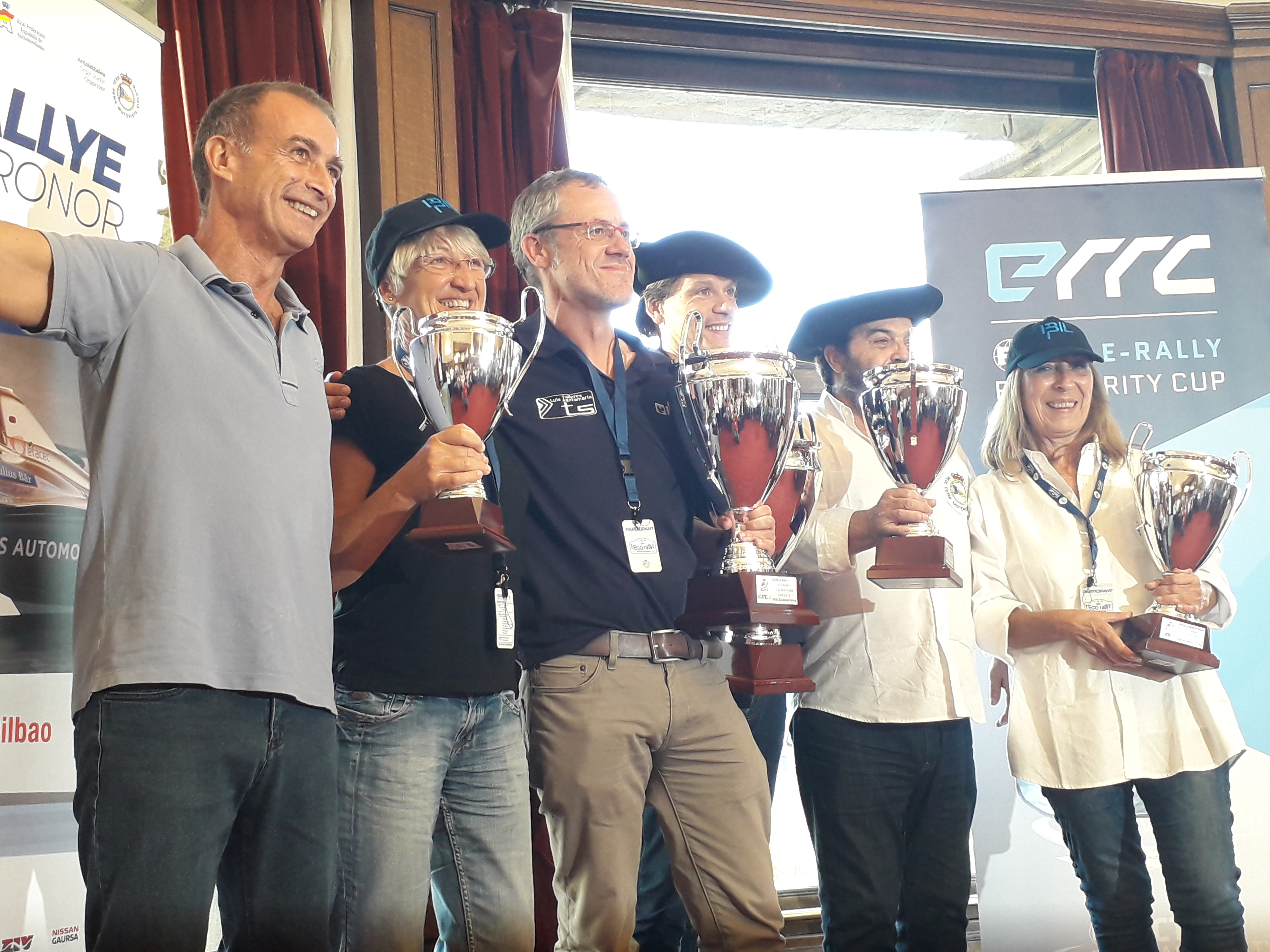 Da sinistra: Javier Moltó, Ana Moltó, Roberto Rentería, Asier Santamaría, Txema Foronda e Pilar Rodas